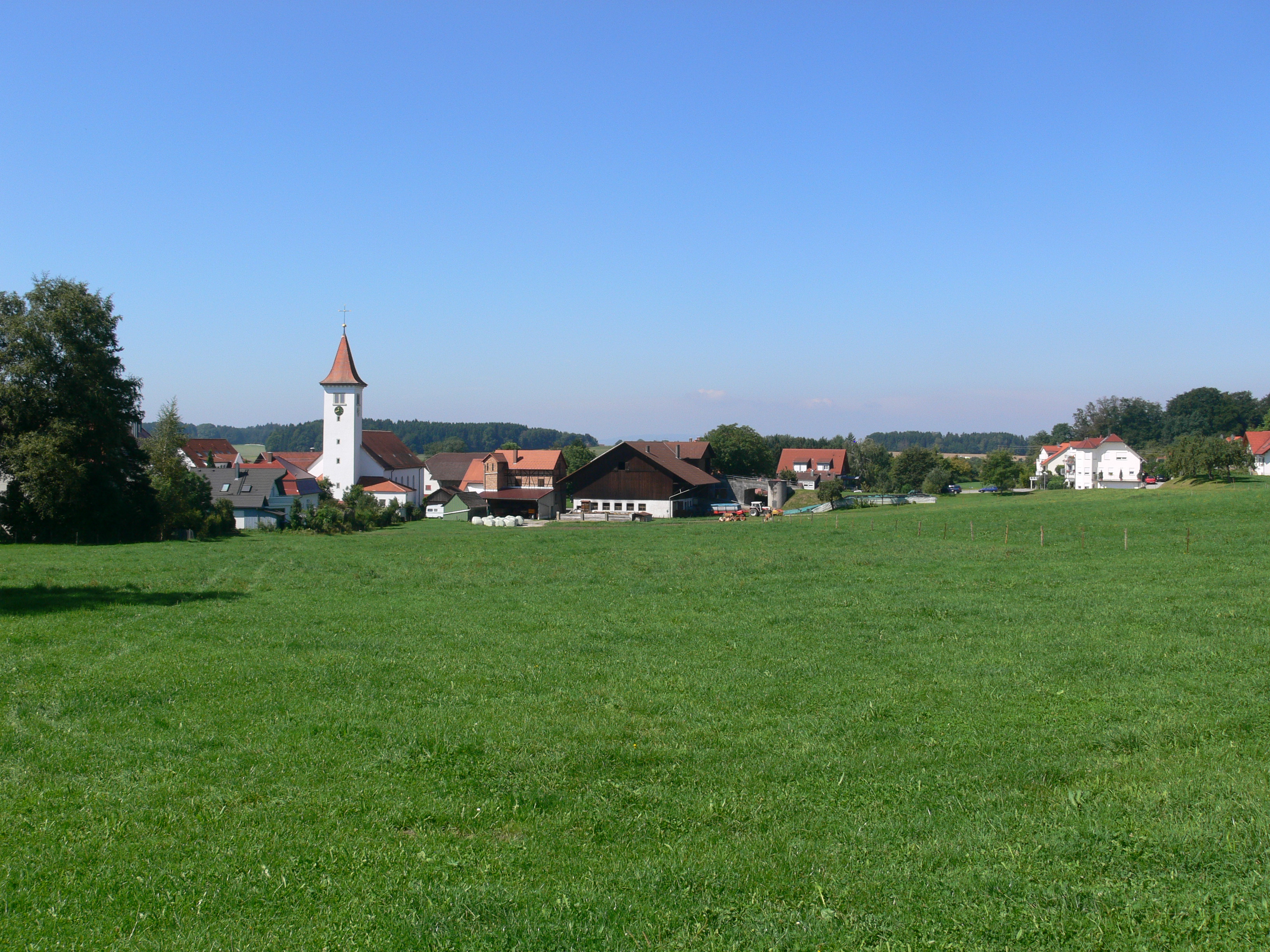 Schlier, Ansicht von Osten (von der Grund- und Hauptschule aus), mit Pfarrkirche St. Martin